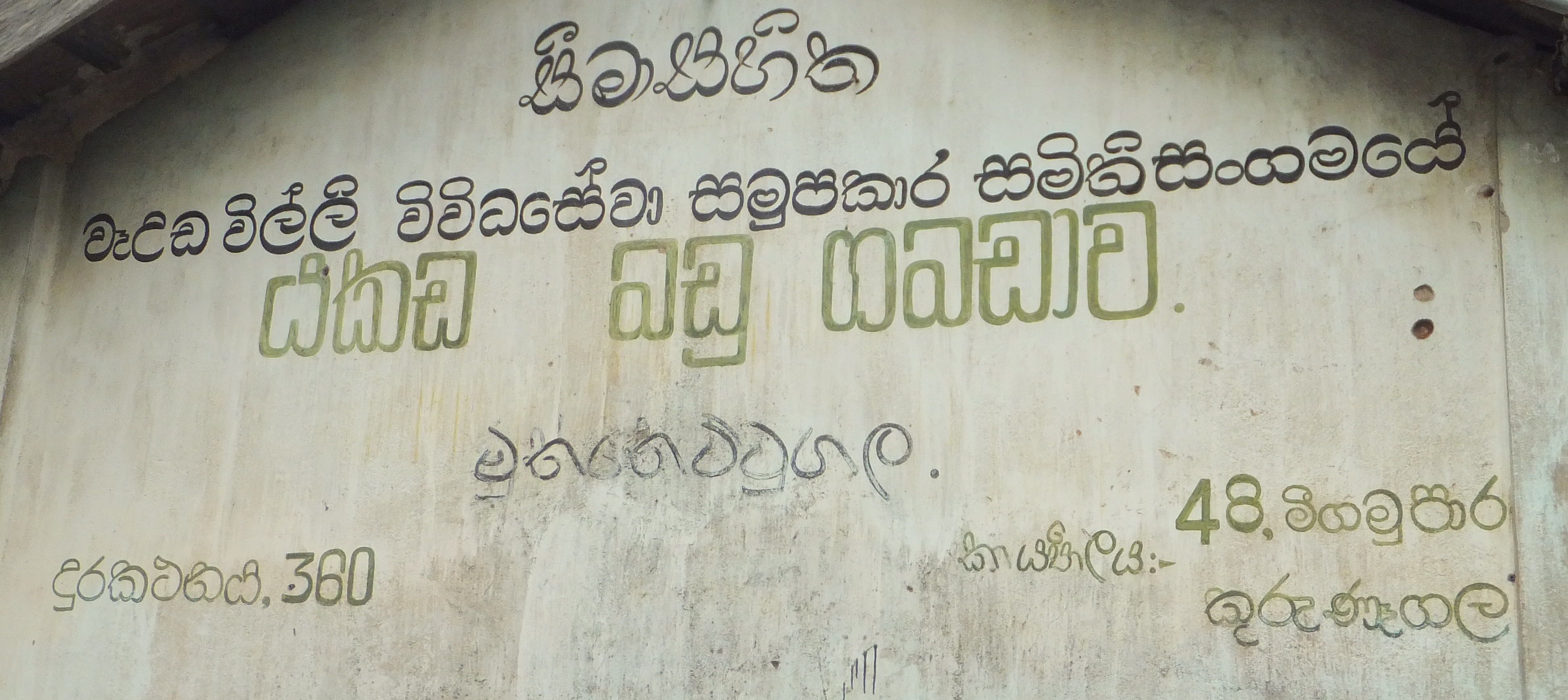 සිංහල: 20වන සියවසේ පිහිටවූ වෑඋඩ විල්ලි සමුපකාර සමිතියේ යකඩ බඩු වෙළෙඳ සැලෙහි පිටත බිත්තිය.